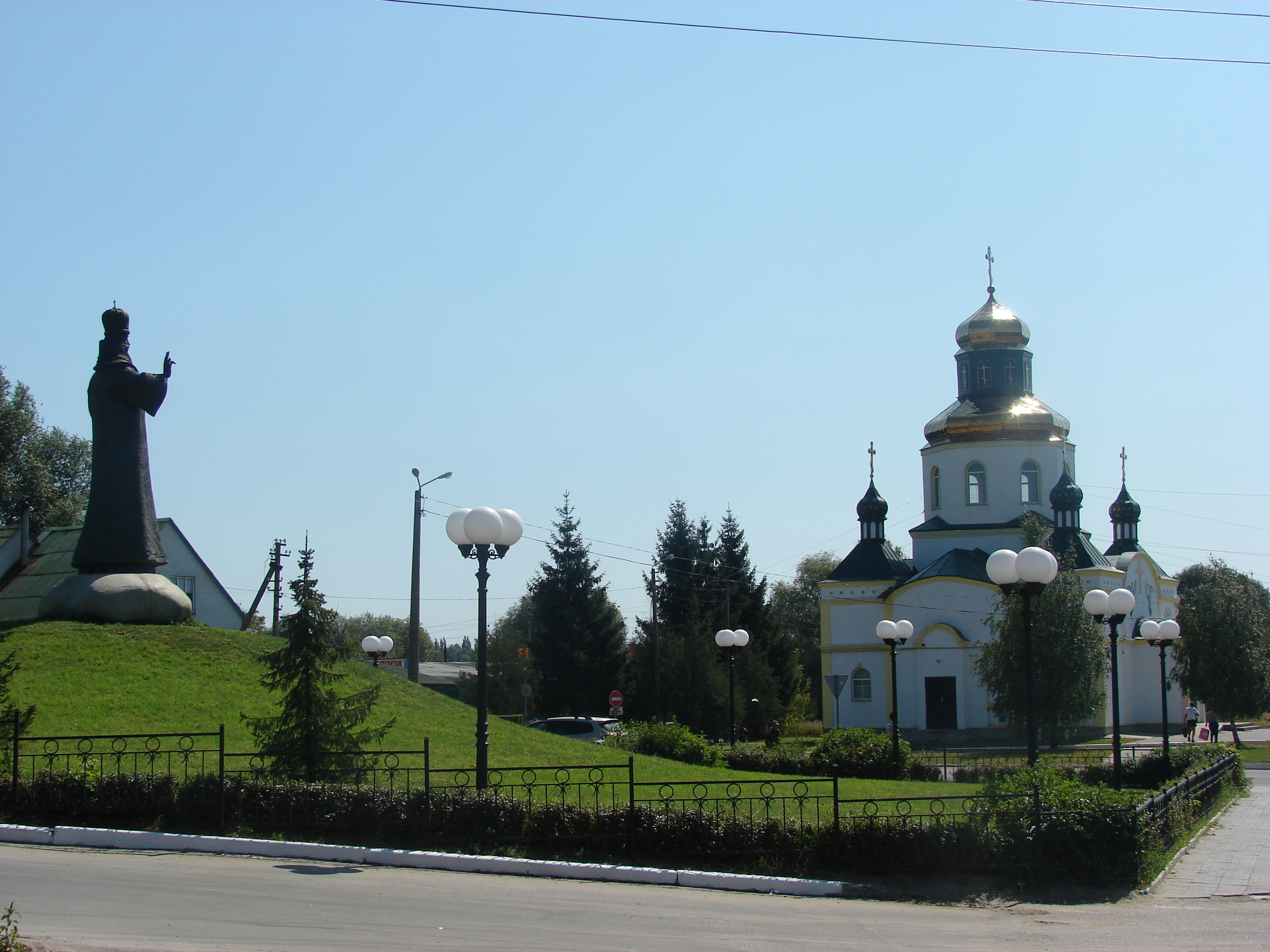 Макарів, Свято-Димитріївська церква і пам'ятник святому Димитрію Ростовському.